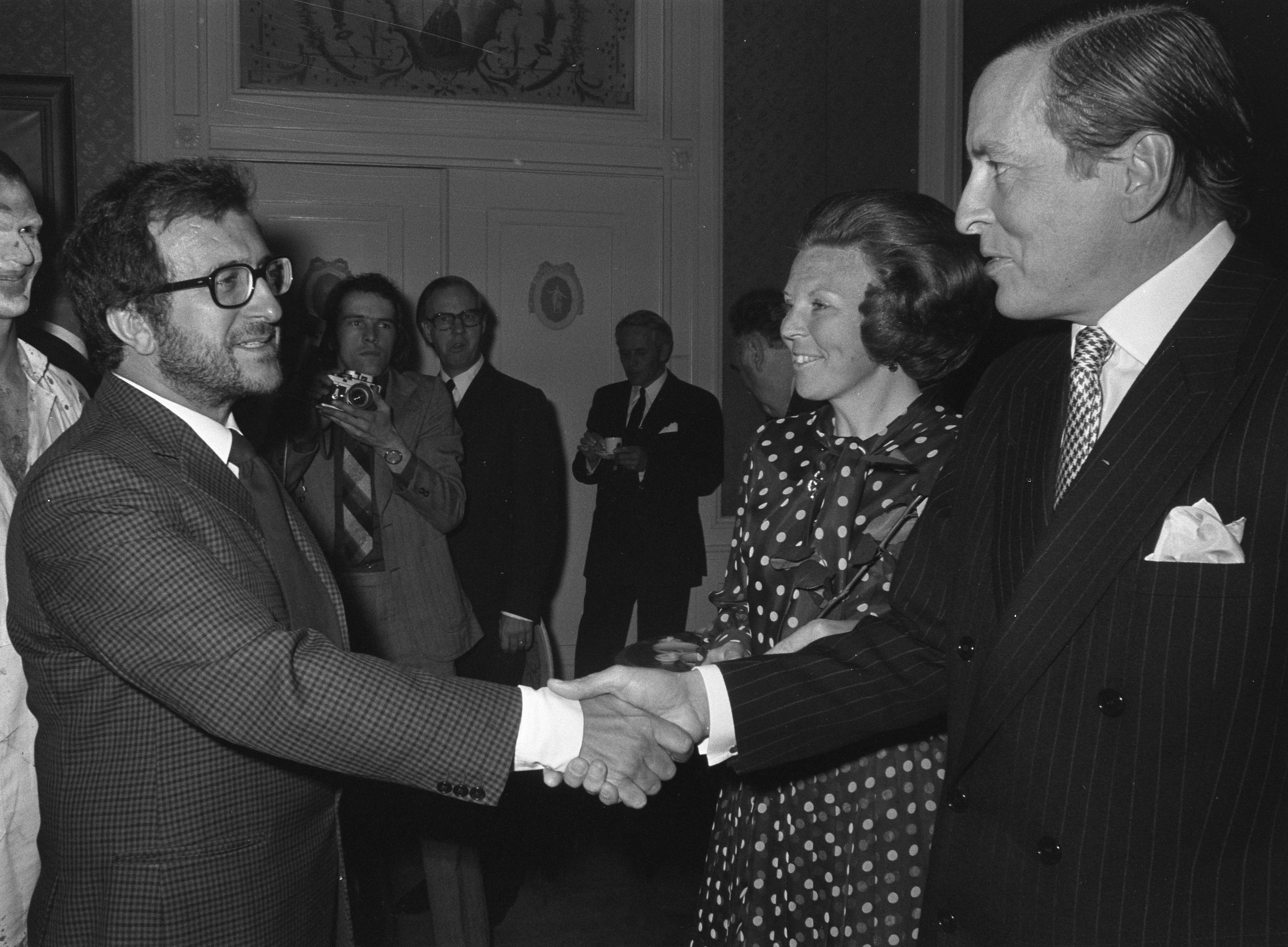 Tijdens de opening van het Holland Festival in de Koninklijke Schouwburg te Den Haag wordt de Italiaanse componist Luciano Berio voorgesteld aan prinses Beatrix en prins Claus